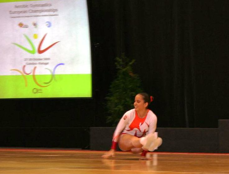 Bucsánszki Linda